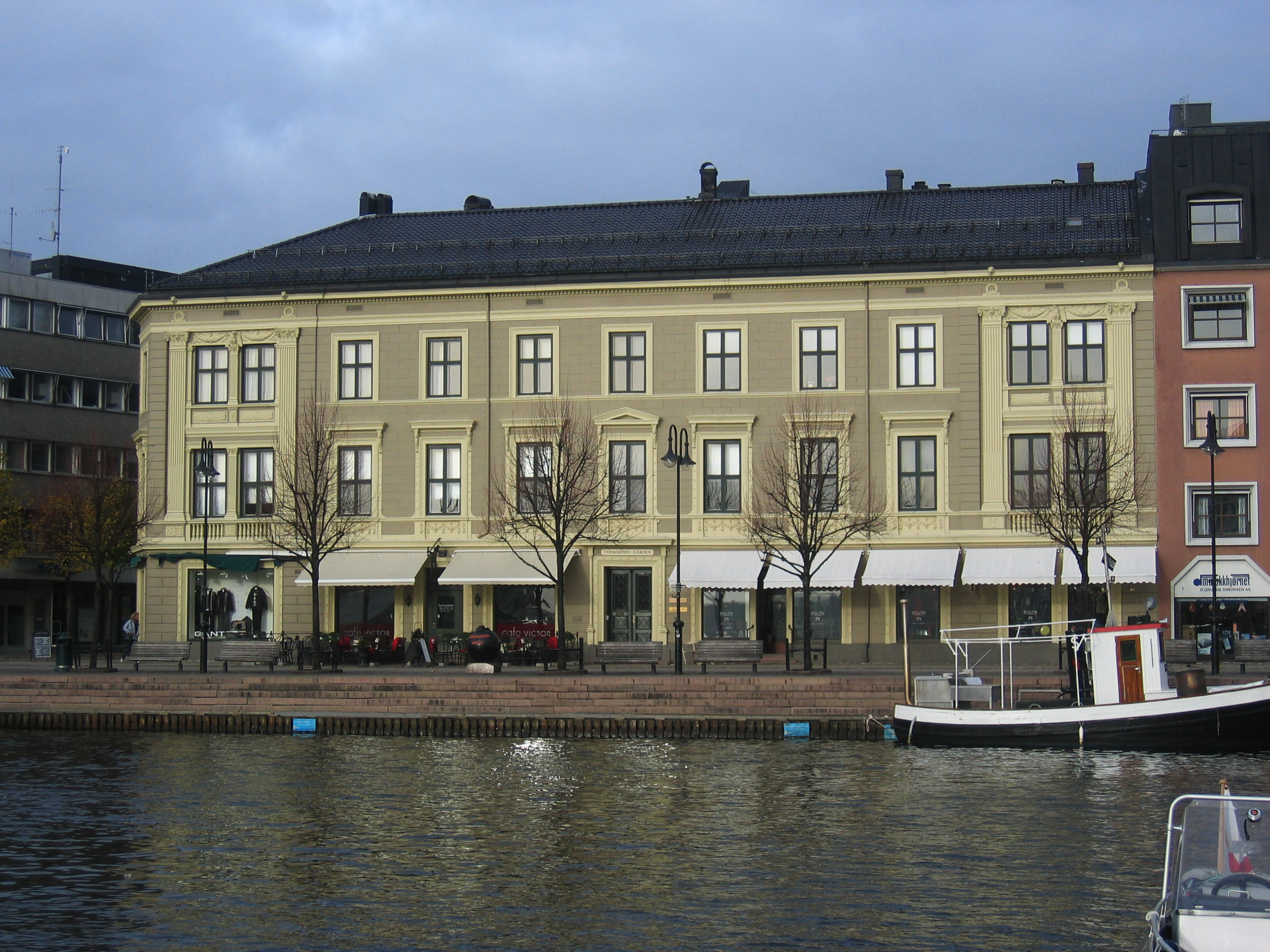 Thommesengården, kjøpmannsgård i mur, bygd 1870, ved Pollen i Arendal.